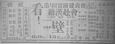 宋非我編劇、聖烽演劇研究會在臺北市中山堂演出之獨幕劇《壁》和三幕劇《羅漢赴會》報紙廣告。